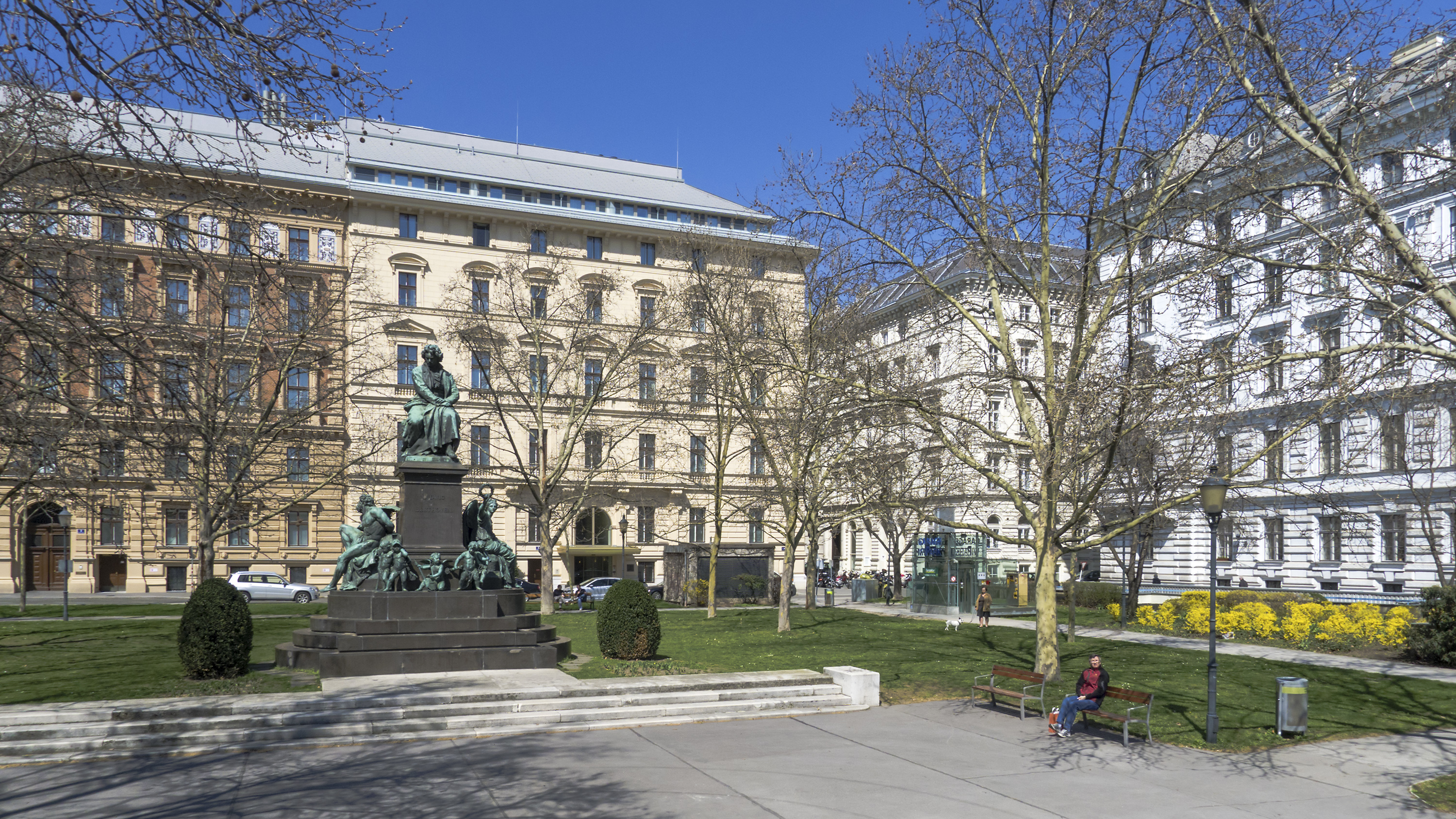 Beethovenplatz in Wien 1 Richtung Nordwesten